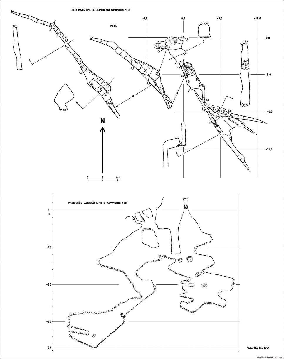 Jaskinia na Świniuszce - plan i przekrój